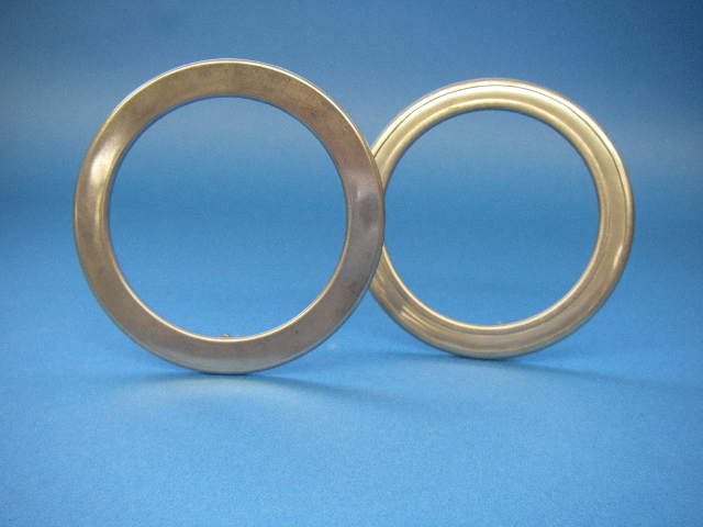 metal jacket